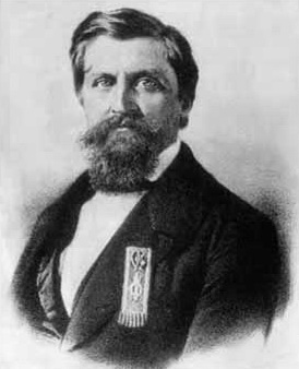 Жорж Шарль де Геккерн Дантес. Около 1855